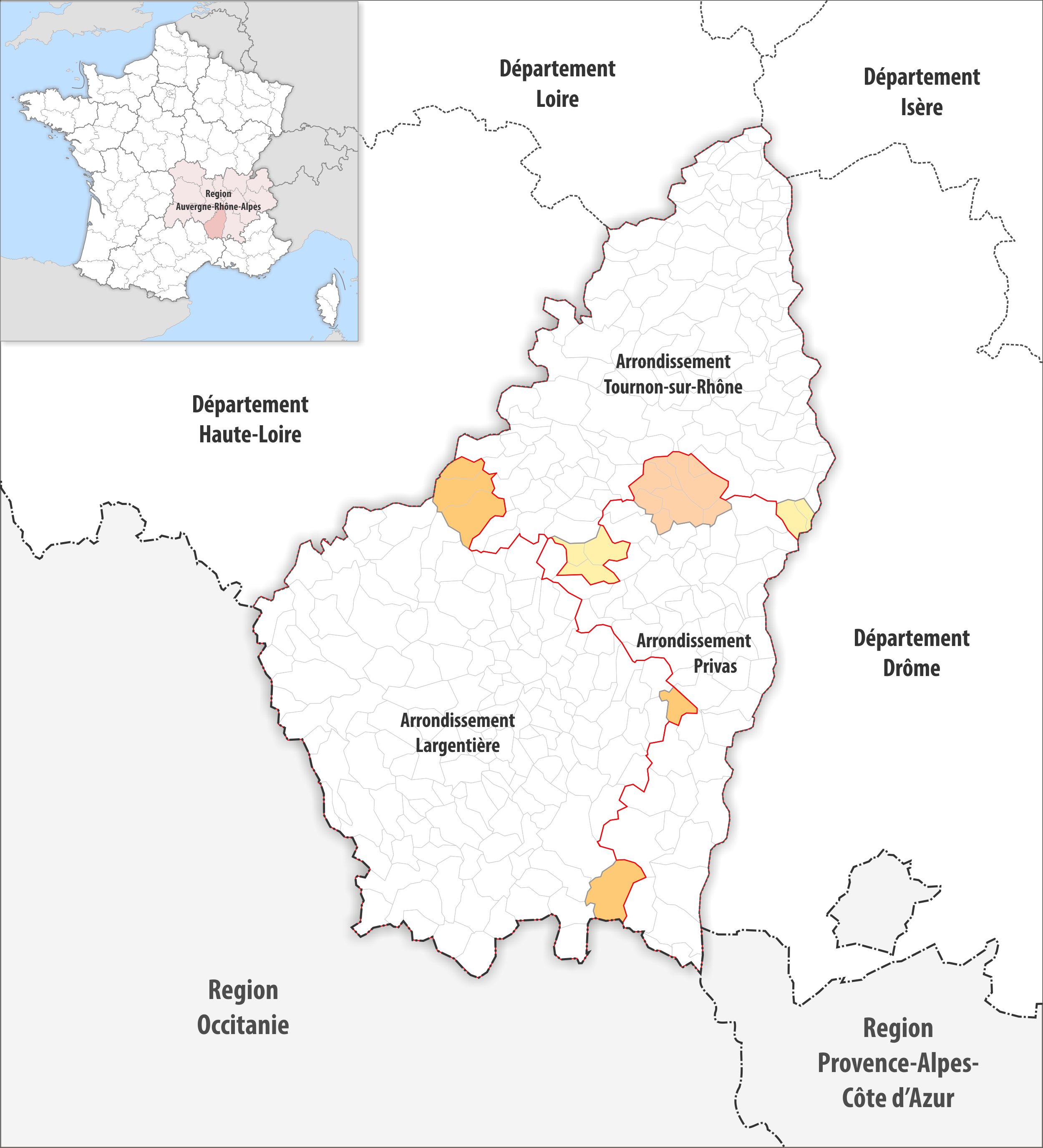 Arrondissements Anpassungen auf 2017 im Departement Ardèche